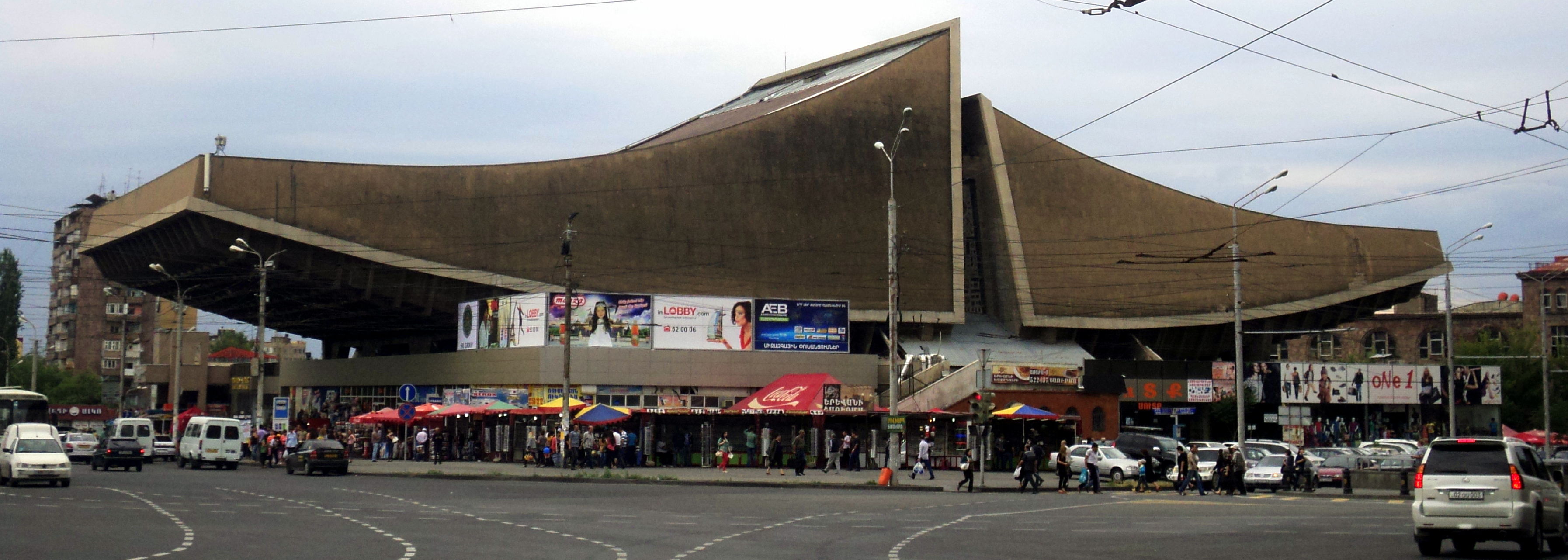 Հեղինակներ` Հրաչ Պողոսյան, Արթուր Թարխանյան, Սպարտակ Խաչիկյան